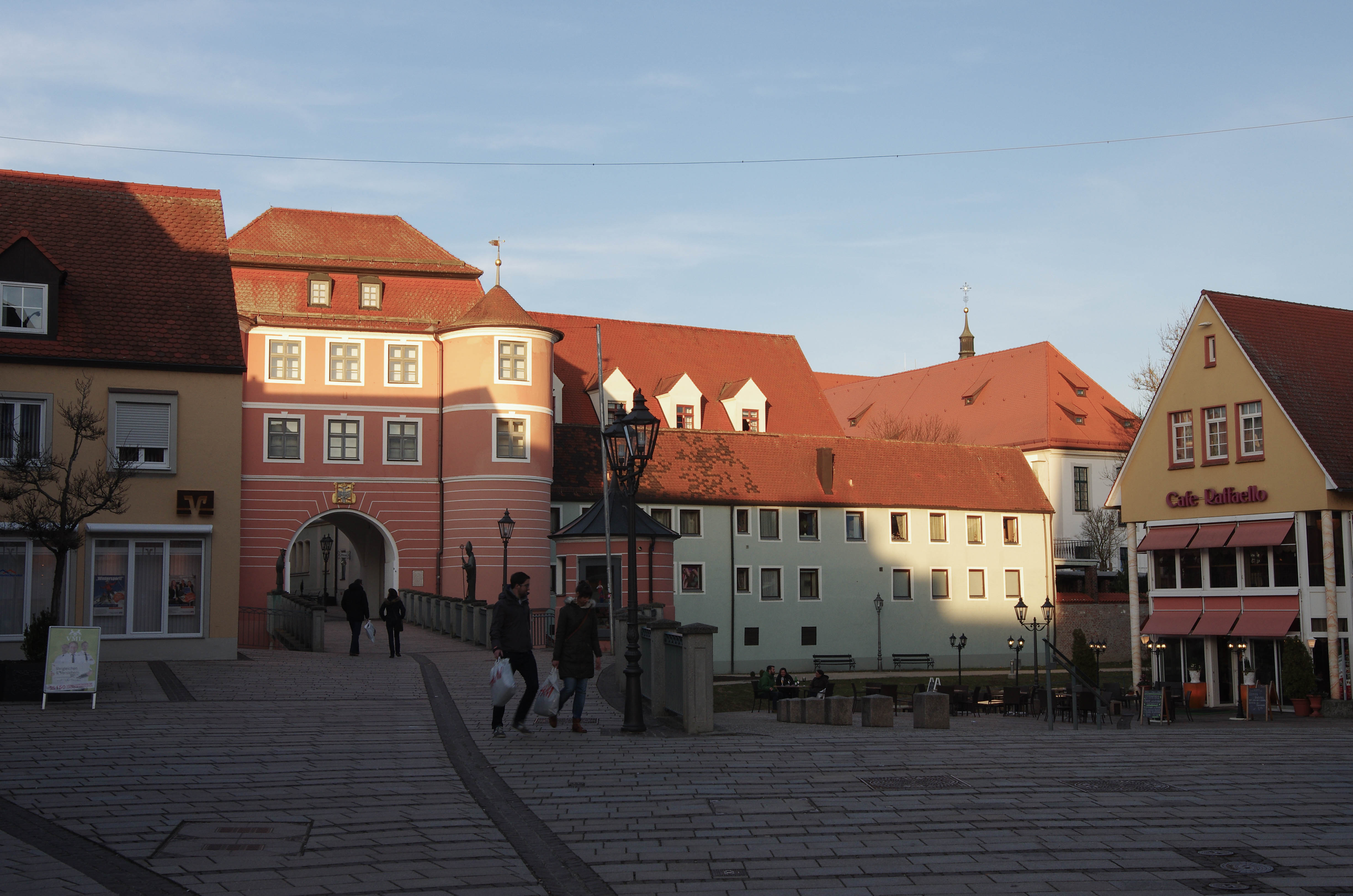 Donauwörth, Hindenburgstraße 1 bzw. Spitalstraße 11 Ansicht von SüdwestenThis is a photograph of an architectural monument.